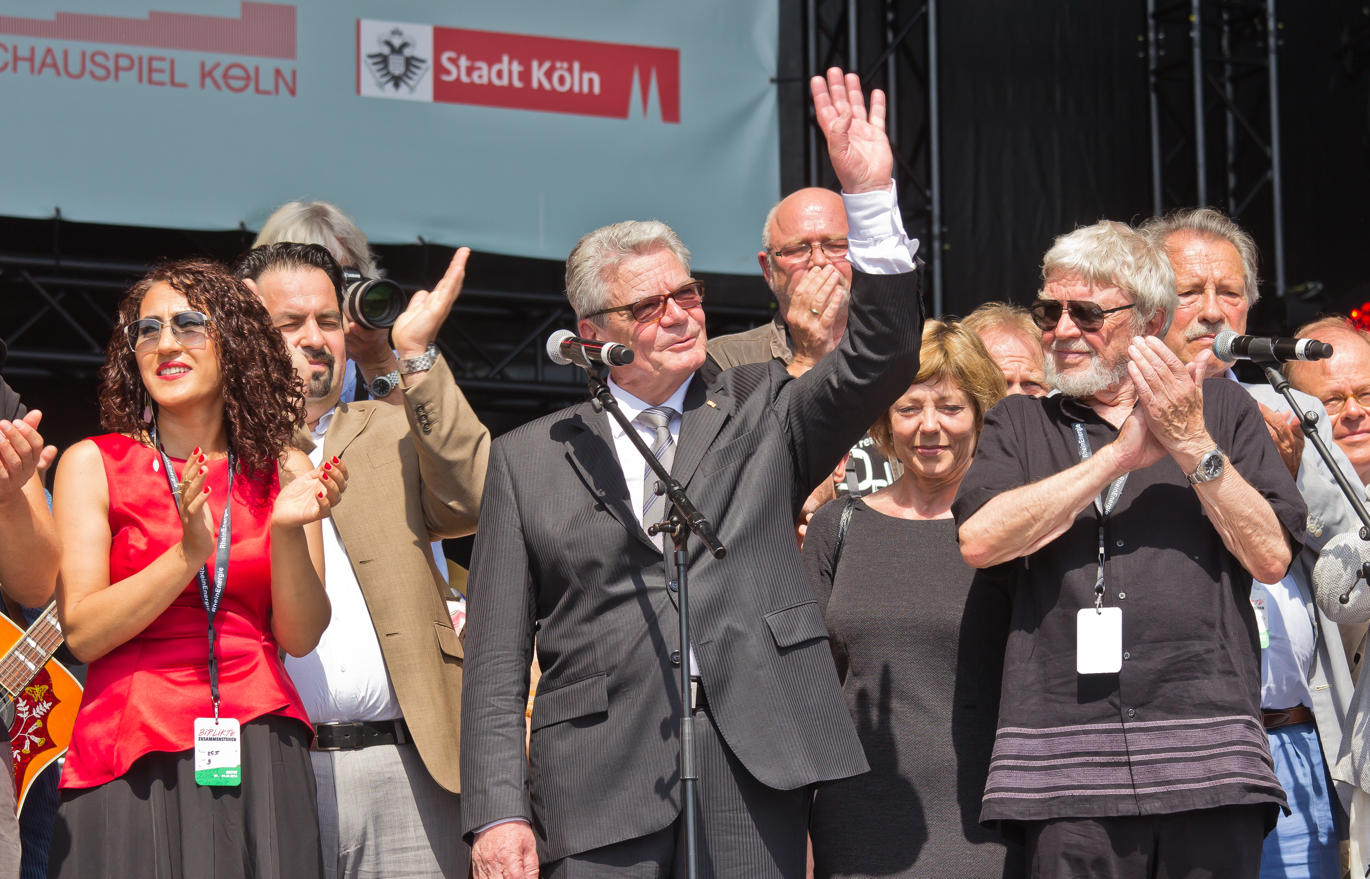 Birlikte - Kundgebung - Rede Bundespräsident Gauck